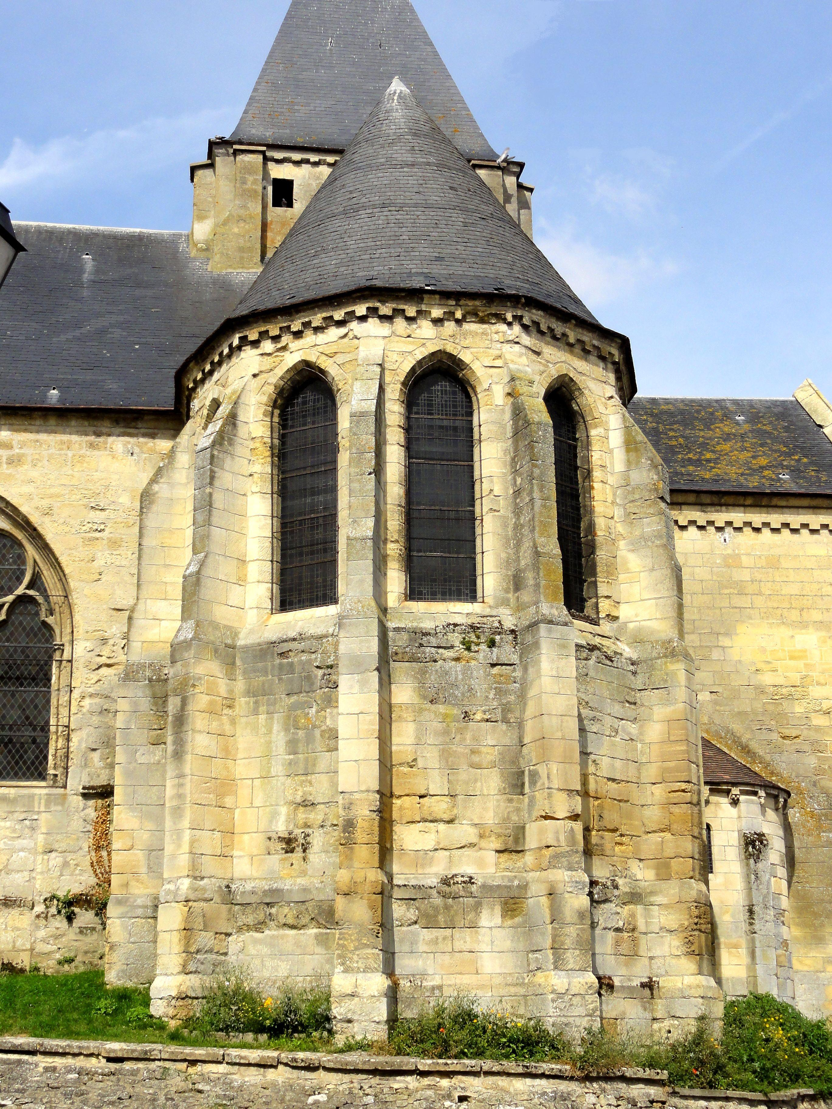 Abside, vue depuis l'est.